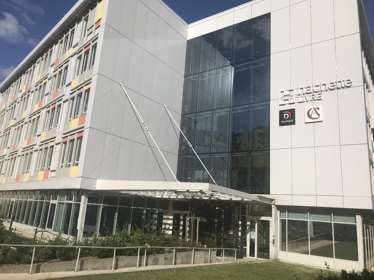 Hachette Malakoff. 11 rue Paul Bert.